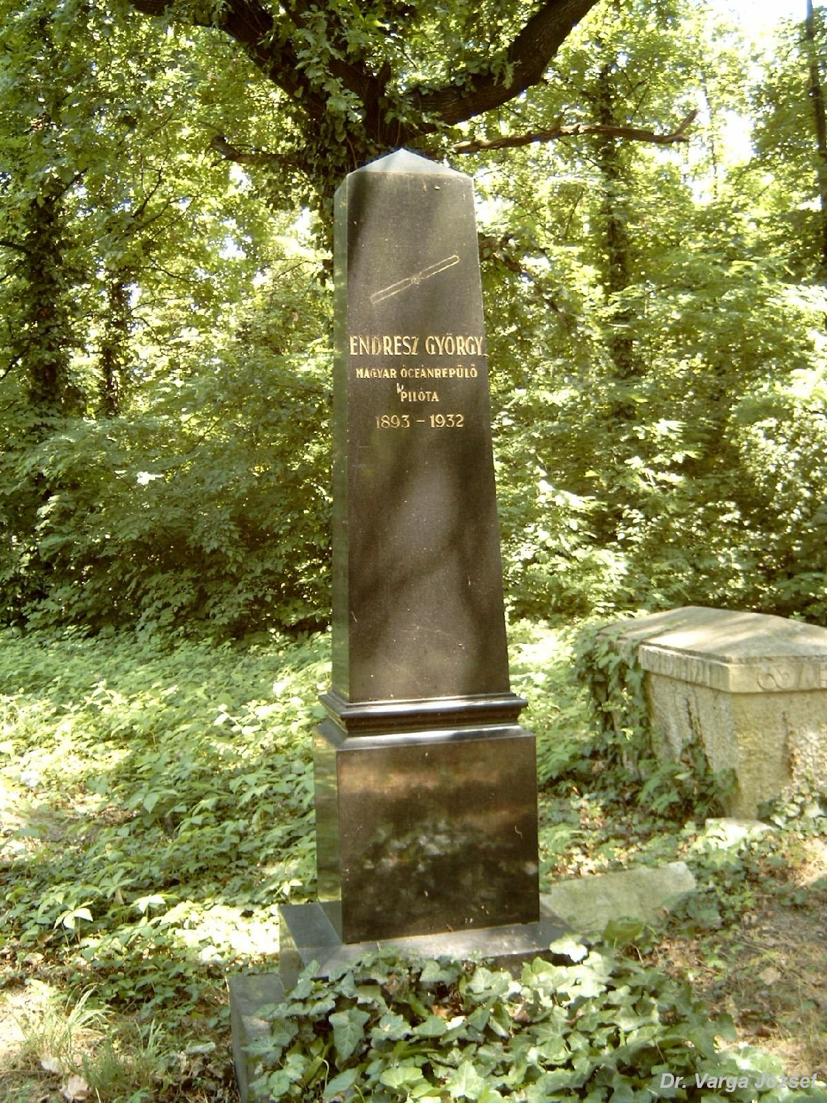 Endresz György sírja Budapesten. Kerepesi temető: 47-1-128.